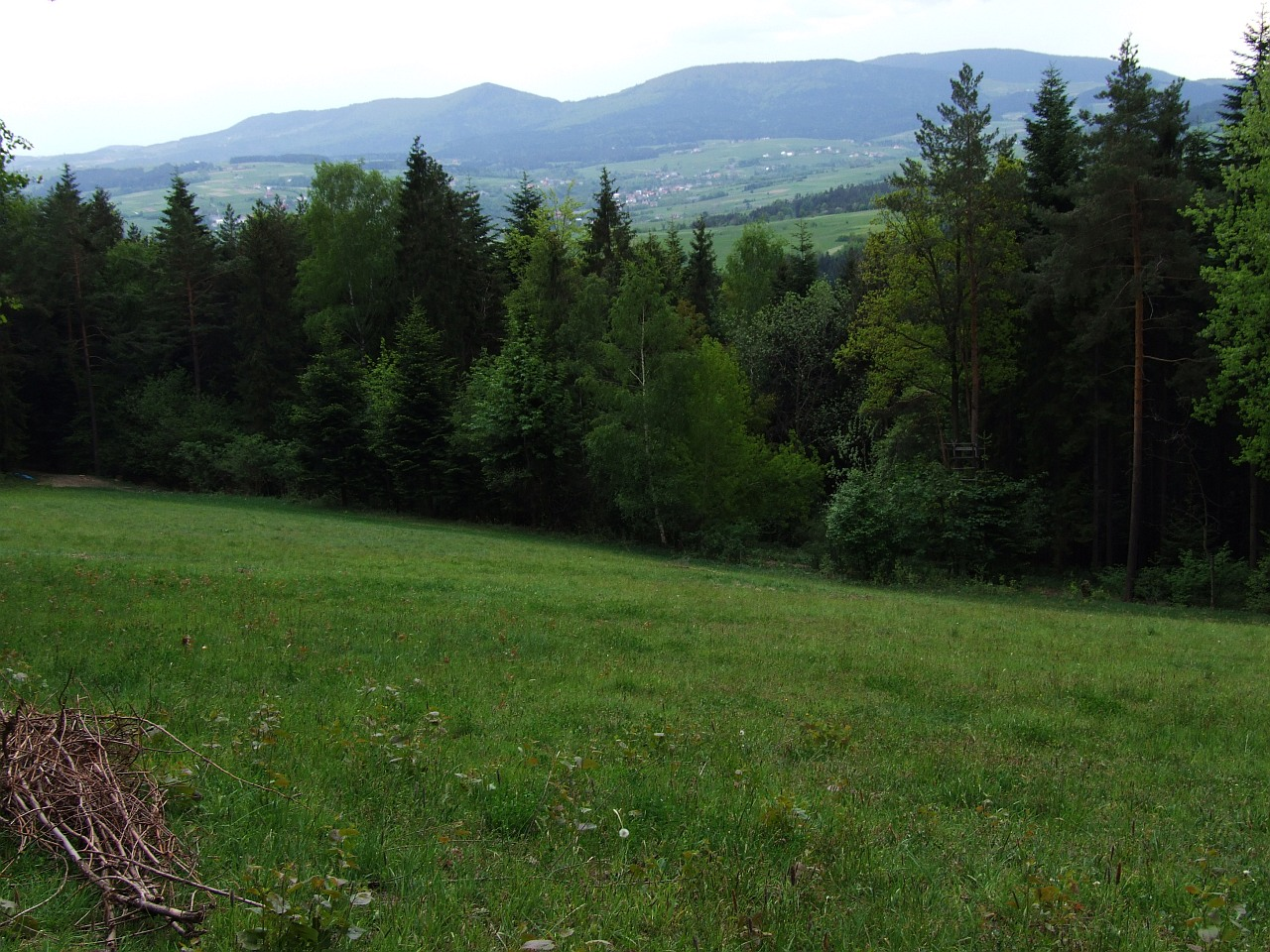 Polana Gładkie Łaziska na Łopieniu (w Słopnicach). widok na Ostrą, Cichoń i Modyń